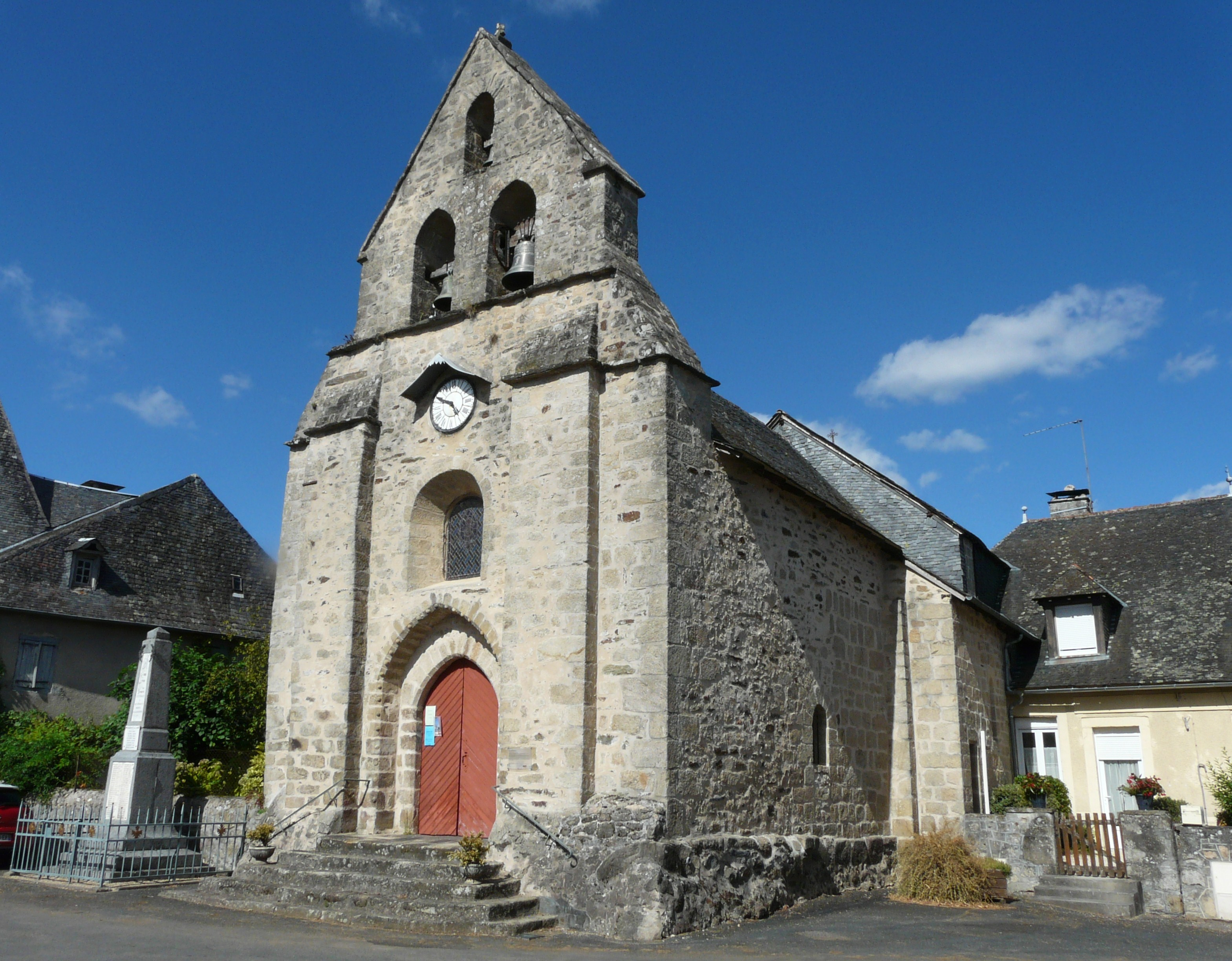 L'église d'Estivaux, Corrèze, France.